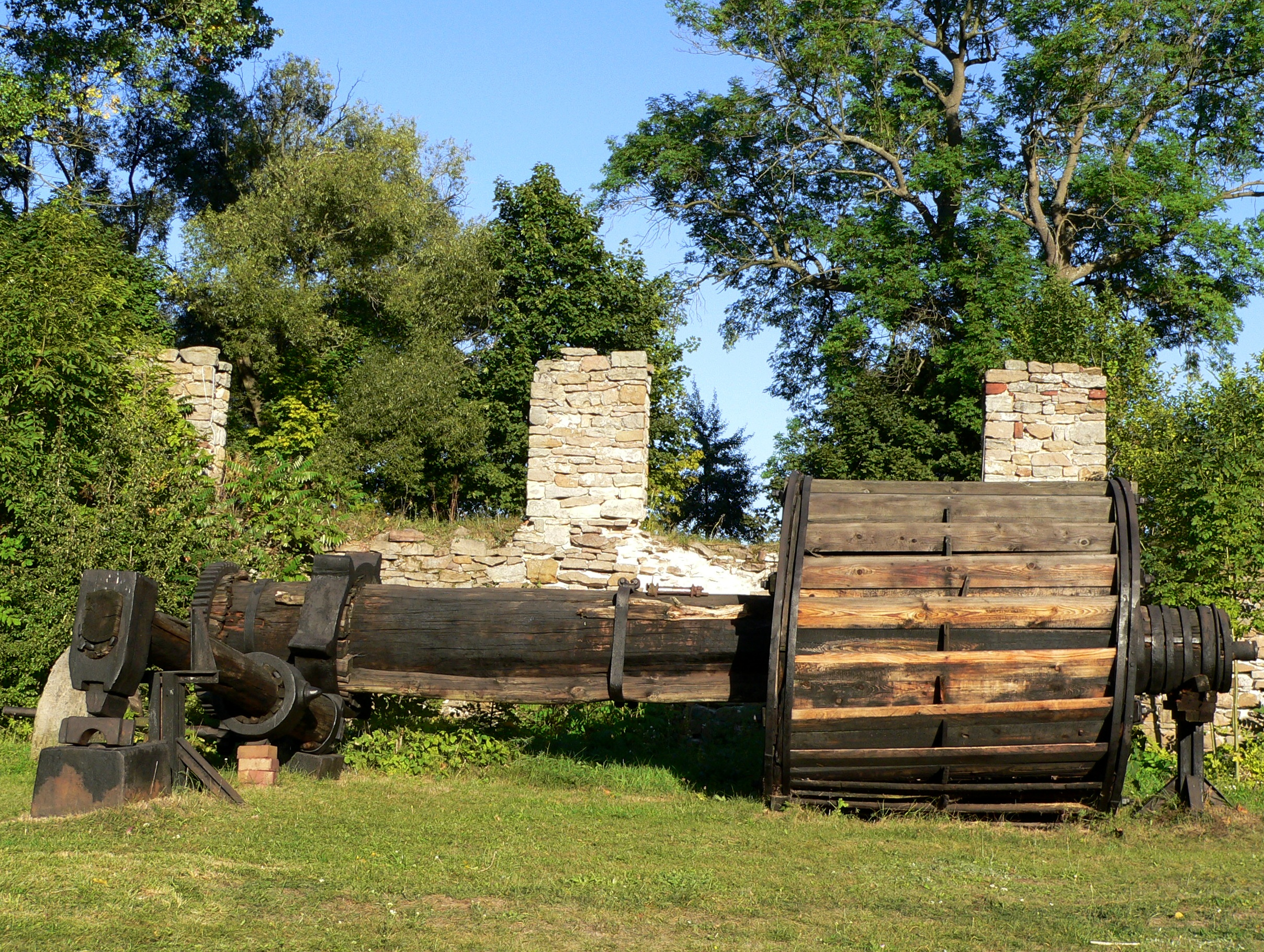 Description: Water wheel and hammer in the Old Industry Museum in Sielpia Wielka, Poland Opis: Koło wodne z młotem z nieistniejącej już kuźni wodnej we wsi Drutarnia - eksponat w Muzeum Zagłębia Staropolskiego w Sielpi Wielkiej, powiat konecki Source: Picture was taken in september 2005 and uploaded by Marek K. Misztal